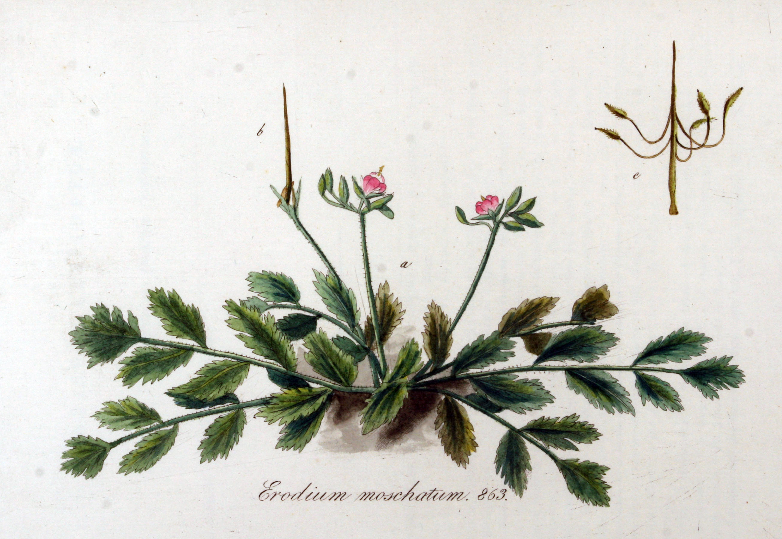 Erodium moschatum (L.) L'Hérit.